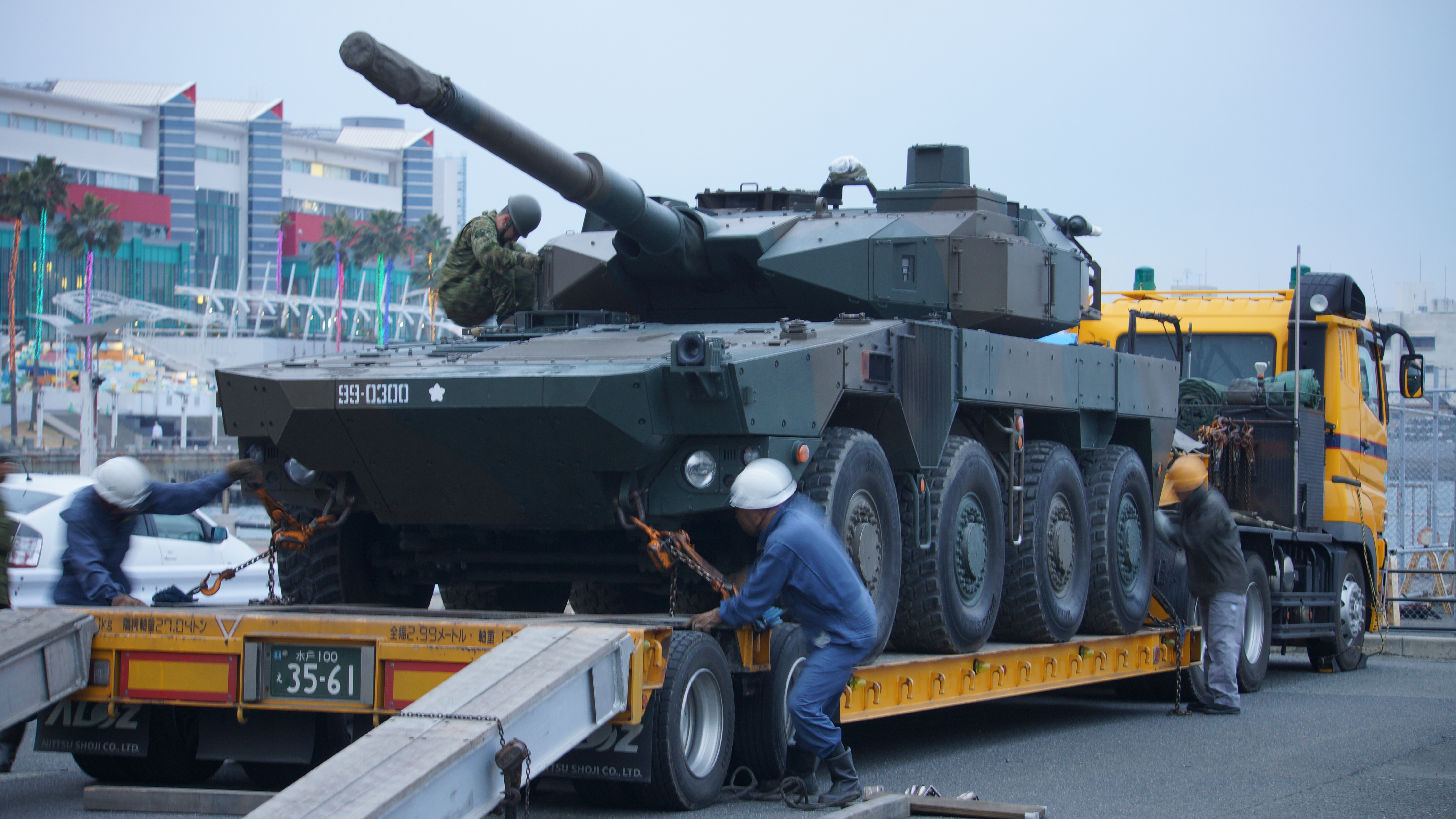 セミトレーラーに積載される、陸上自衛隊 16式機動戦闘車（試作車、99-0300号車）。2017年3月5日 大阪南港ATCにて開催されたOSAKA防衛防災フェスティバル2017にて。